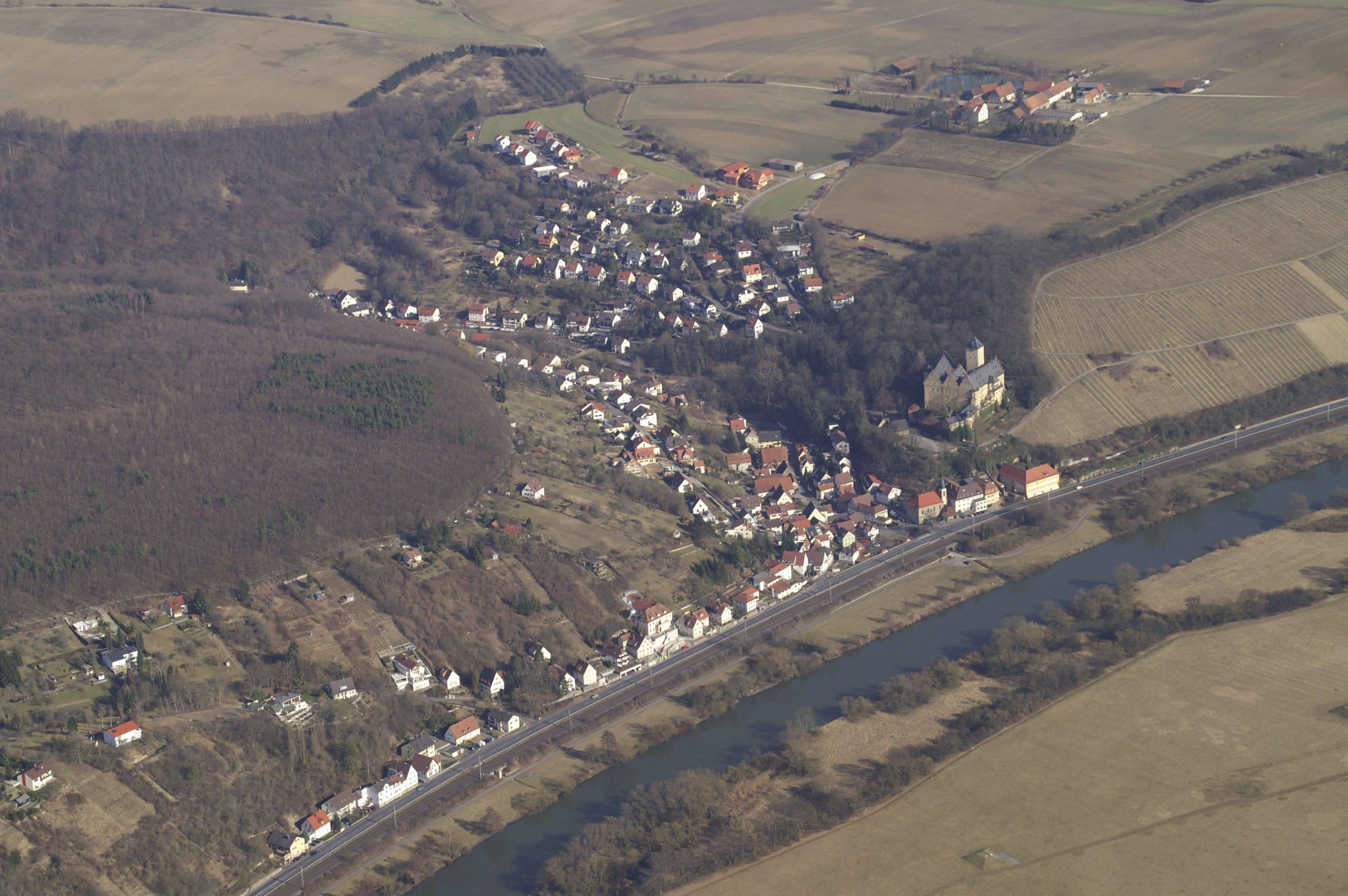 Mainberg aus der Luft 2008